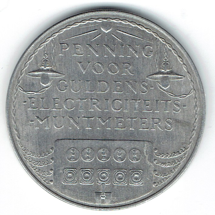 Achterzijde elektriciteitspenning van de gemeente Amsterdam (ontwerp uit 1918, uitgevoerd in aluminium, waarde 1 gulden)